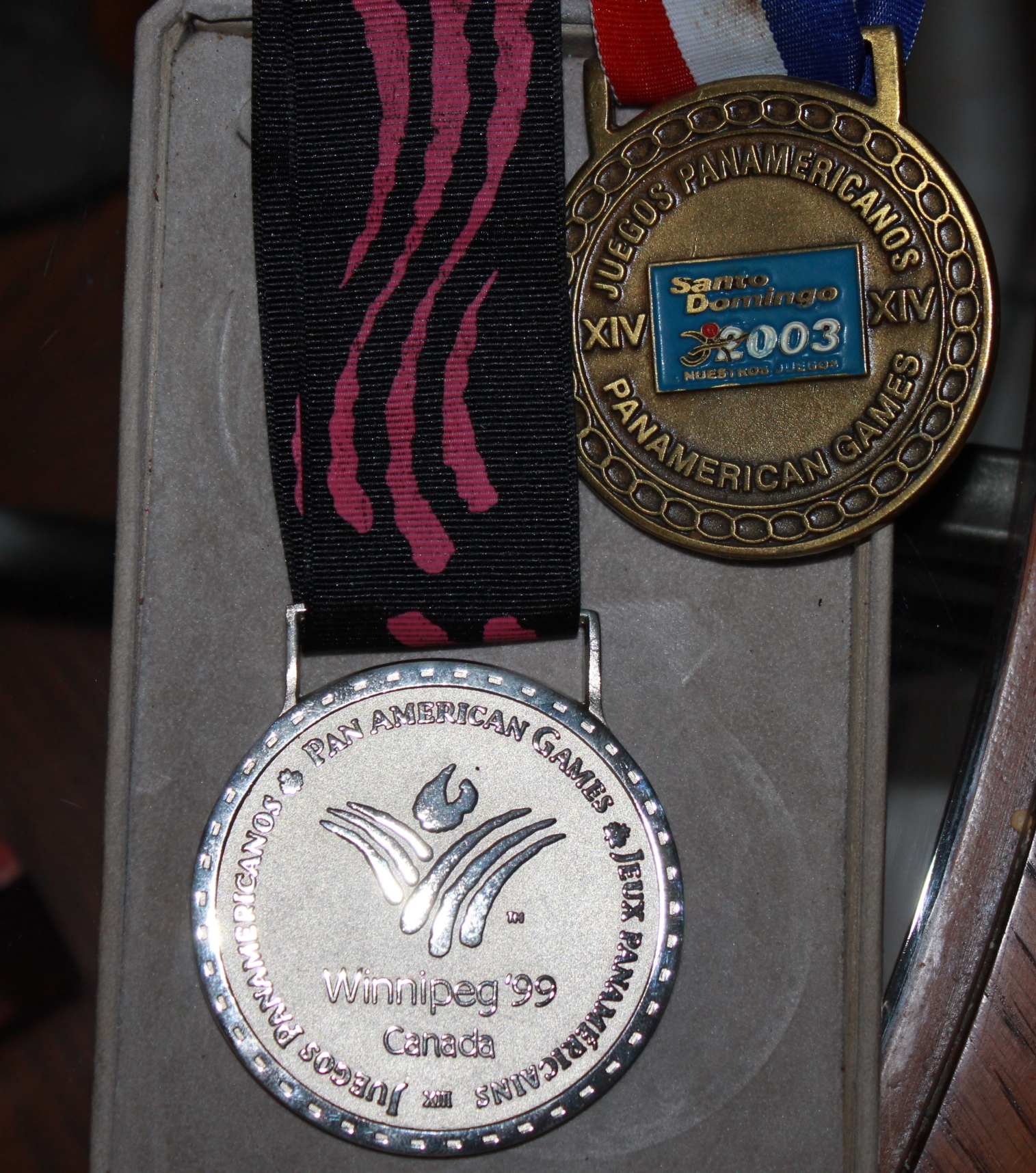 Medallas de la nadadora panameña Eileen Coparropa en los Juegos Panamericanos de Winnipeg, Canadá 1999 y Santo Domingo,República Dominicana 2003.